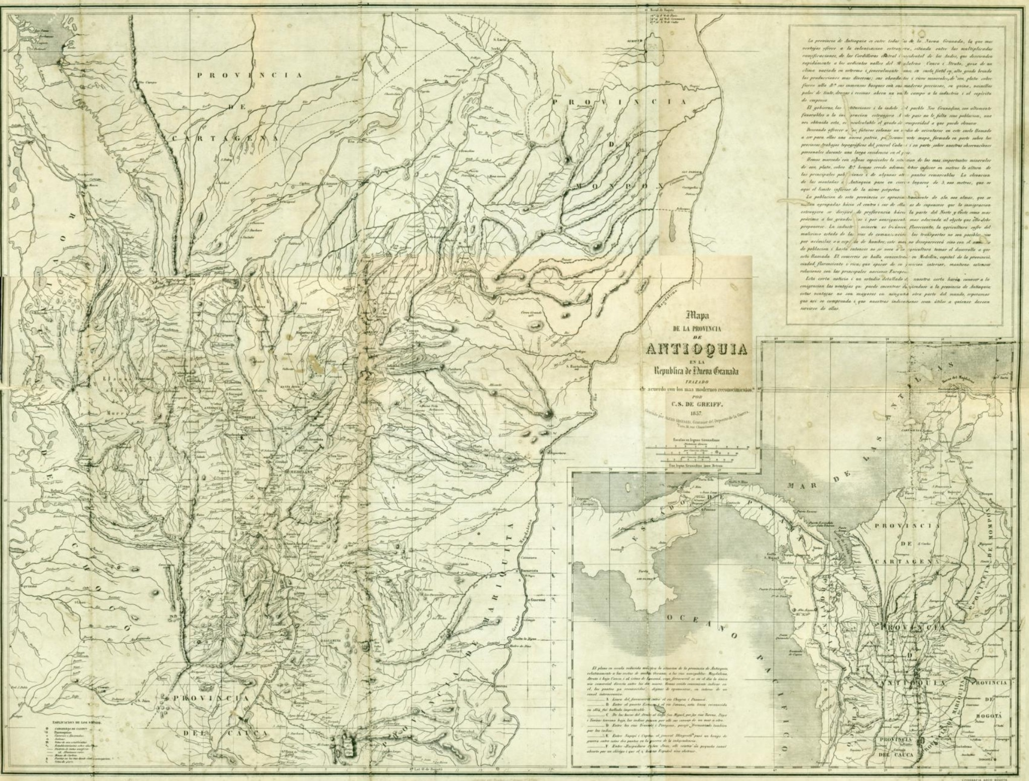 Mapa de la Provincia de Antioquia en la Nueva Granada, dibujado por Carlos Segismundo de Greiff en 1857